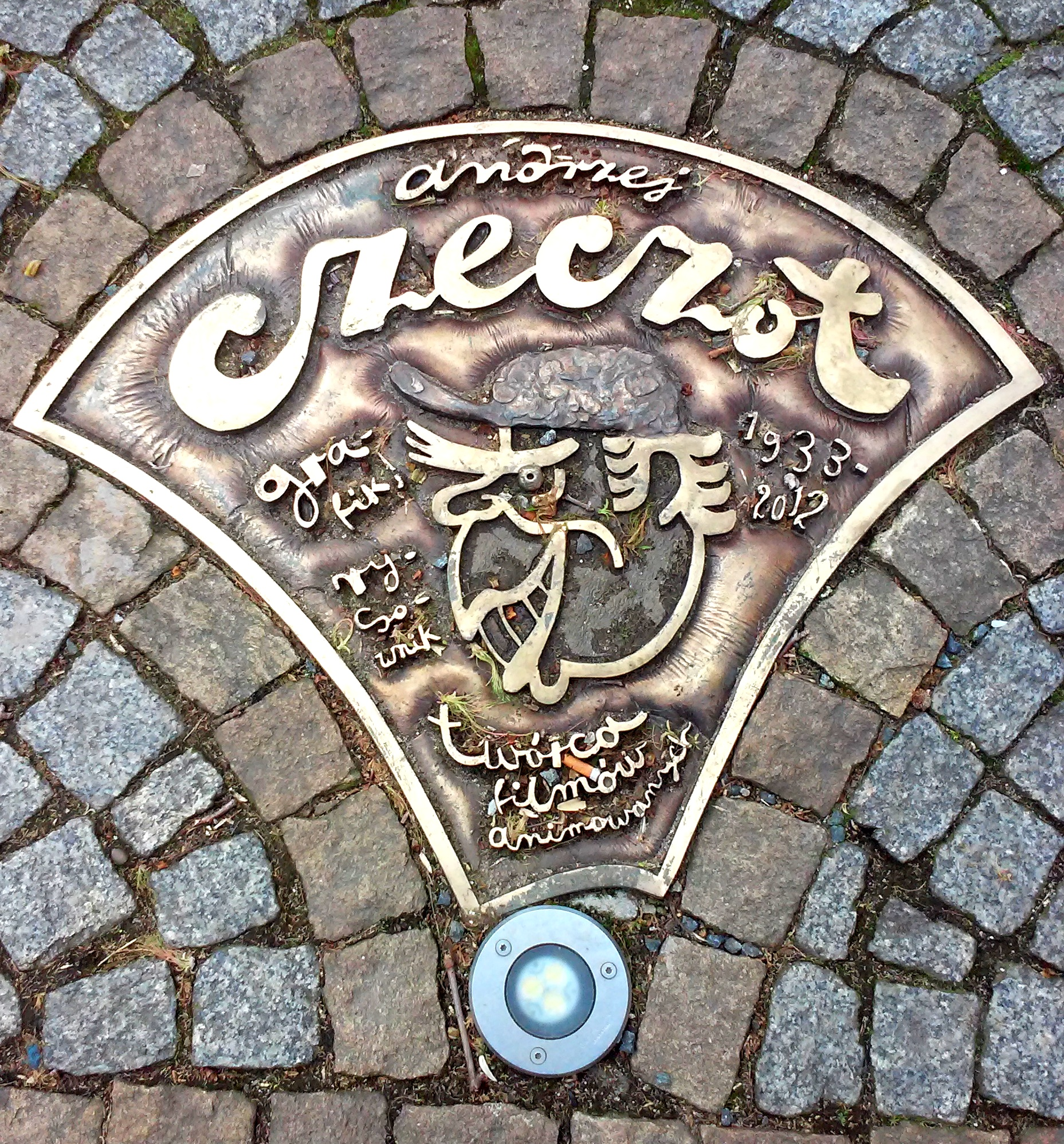 Legnica, Aleja Gwiazd Satyrykonu, tablica pamiątkowa - Andrzej Czeczot